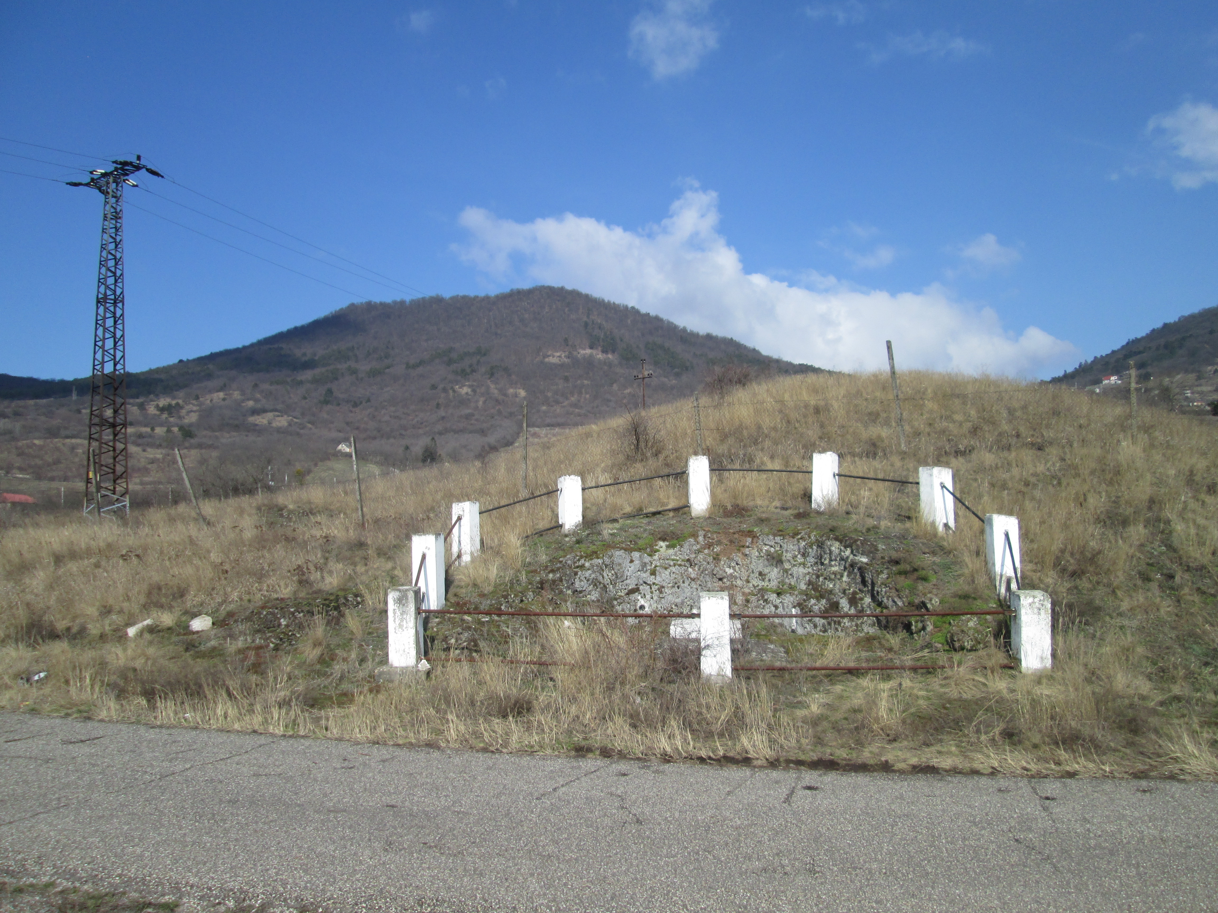 Egységes országos magassági alaphálózat (EOMA) "Baksipart" megnevezésű főallappontja Sátoraljaújhelyen, létesült 1952-ben.